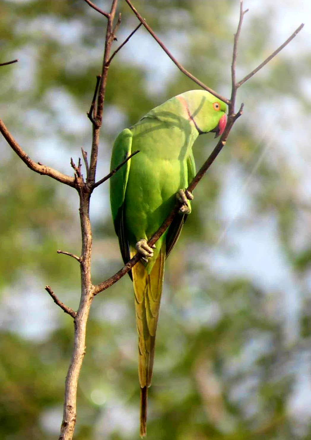 Periquitos de Colar são um tipo de ave ornamental